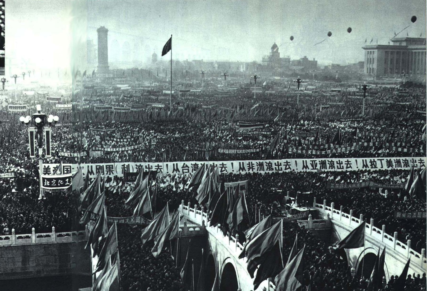 1965-01 天安门 支持刚果反对美国